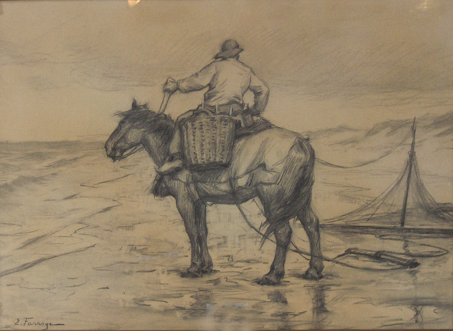 "Oostduinkerkse garnaalvisser te paard"; houtskooltekening door Edgard Farasyn (1858-1938)